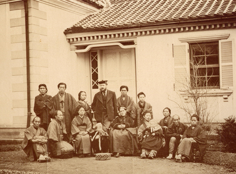 McVean Family at Yamato Yashiki, 1873.